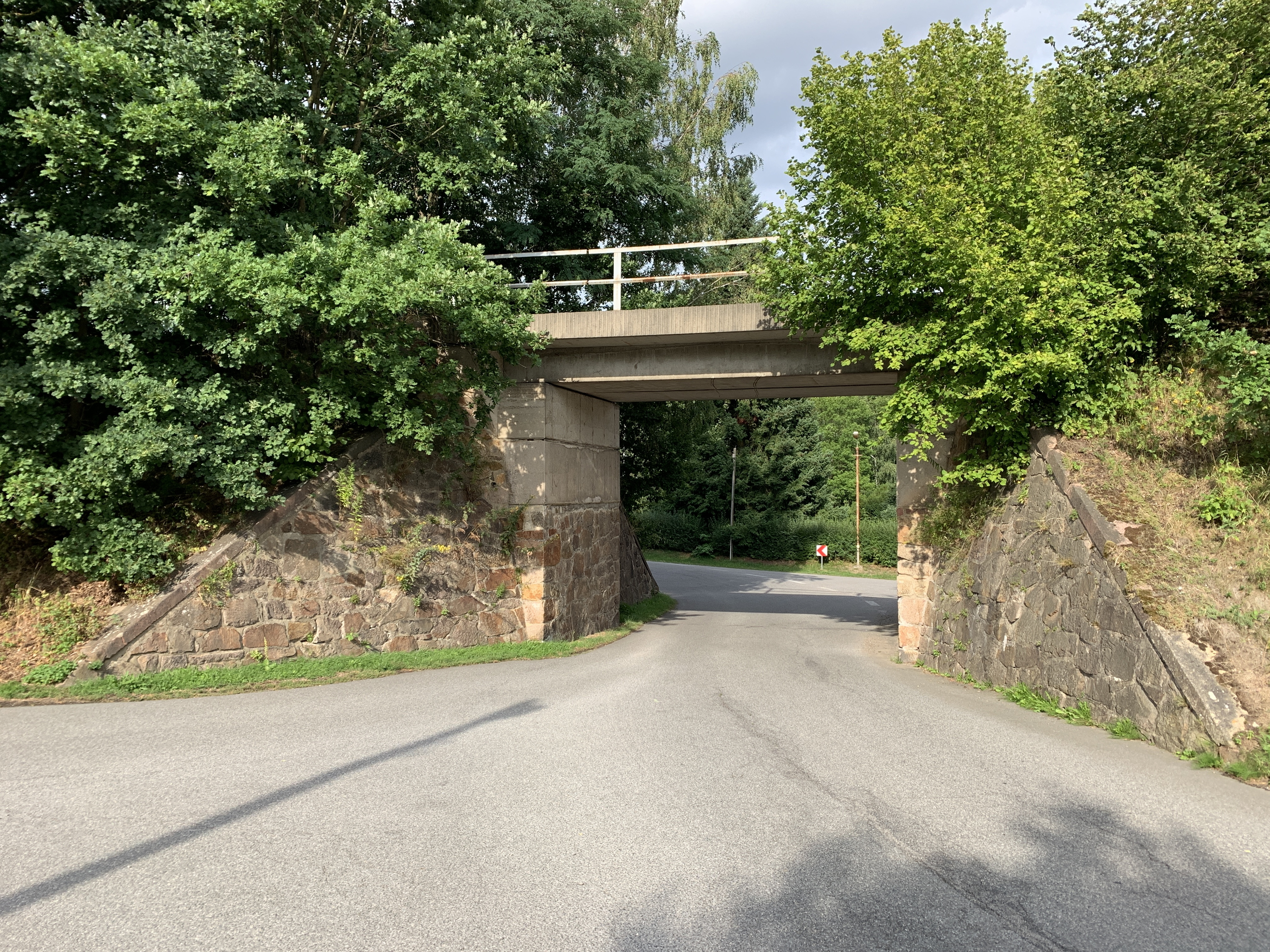 Brücke der Muldentalbahn in Thierbach, ein Ortsteil von Penig